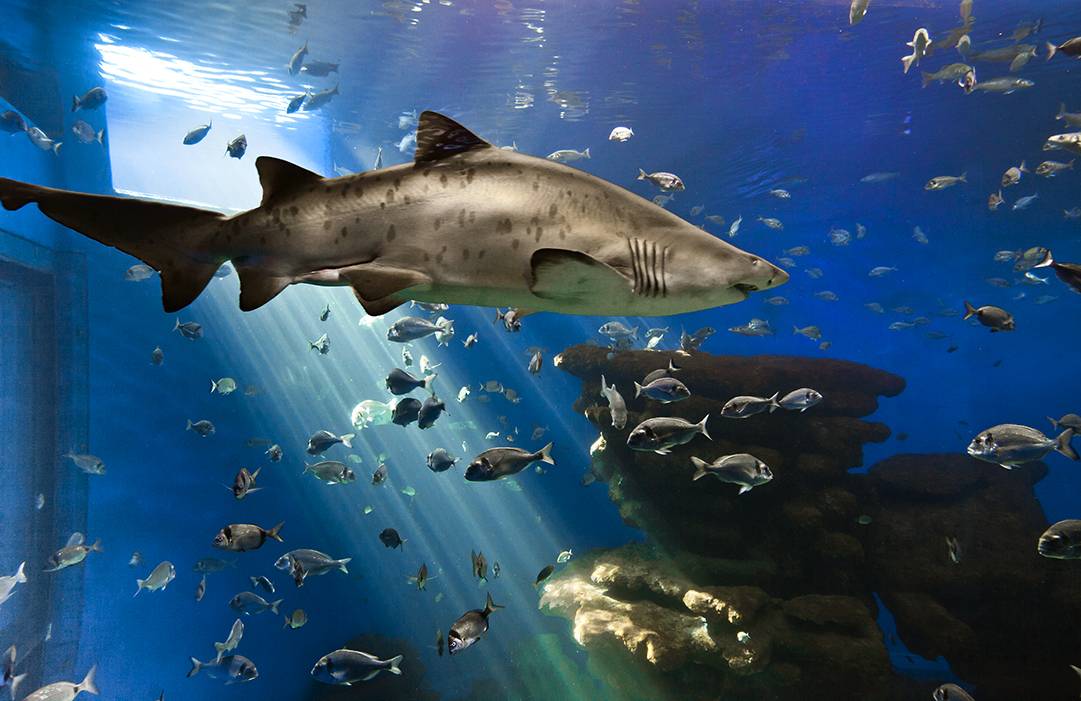 Instalaciones palma aquarium